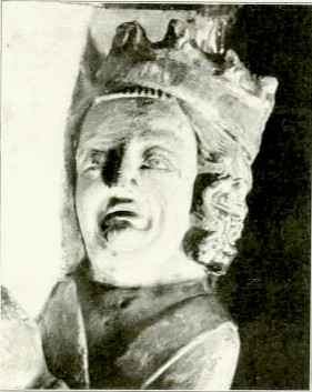 St. Lorenzkirche in Alten Hof in Munich